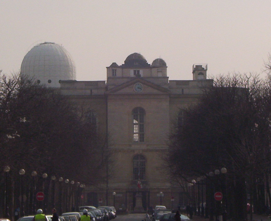 Photo prise par moi-meme en mars 2006